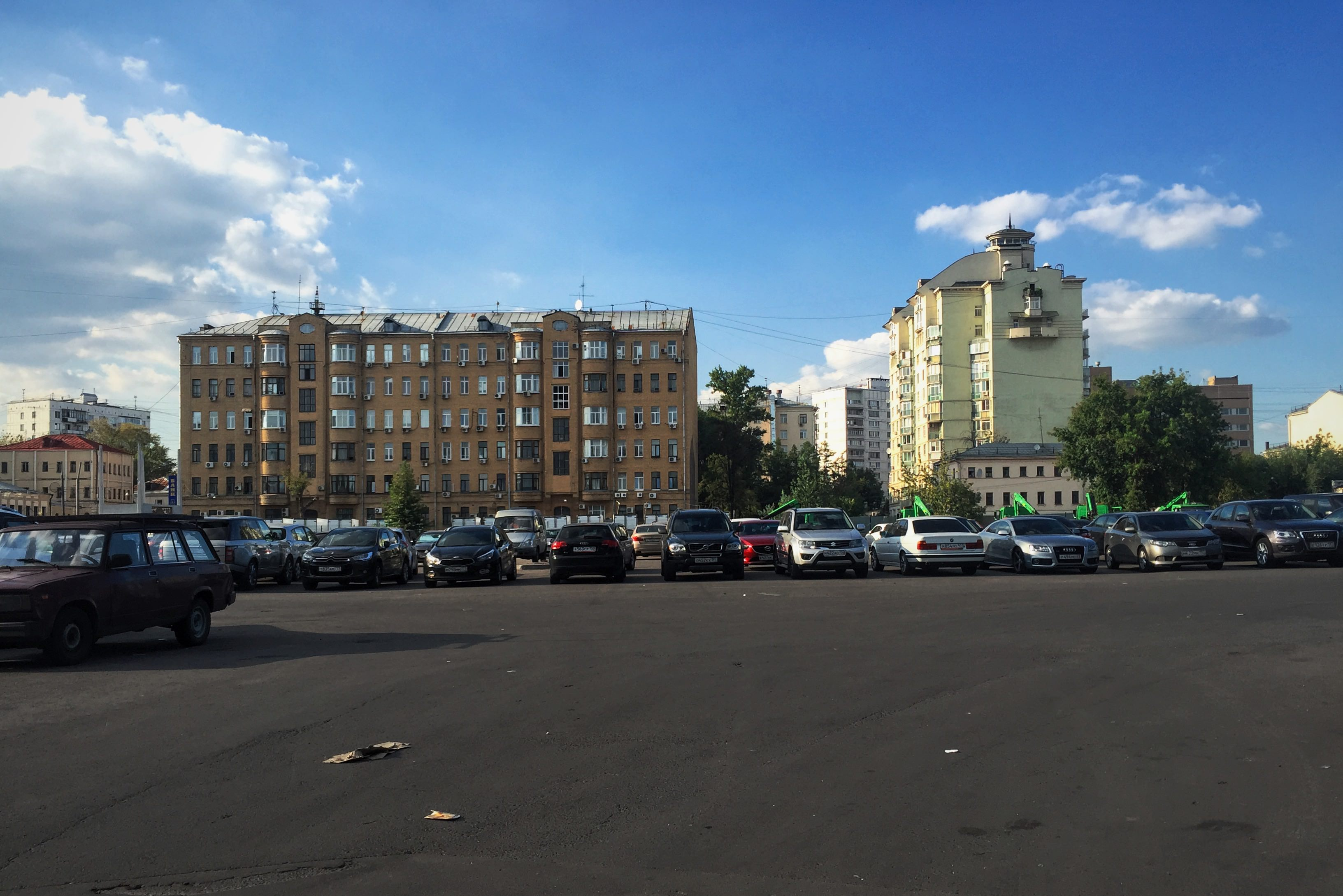 Здесь стоял Бауманский рынок, рухнувший в 2006 году (Обрушение Басманного рынка). Территория между Бауманской, Старокирочным (с него сделано фото) и Посланниковым (линия домов за парковкой) - по-прежнему не занята.